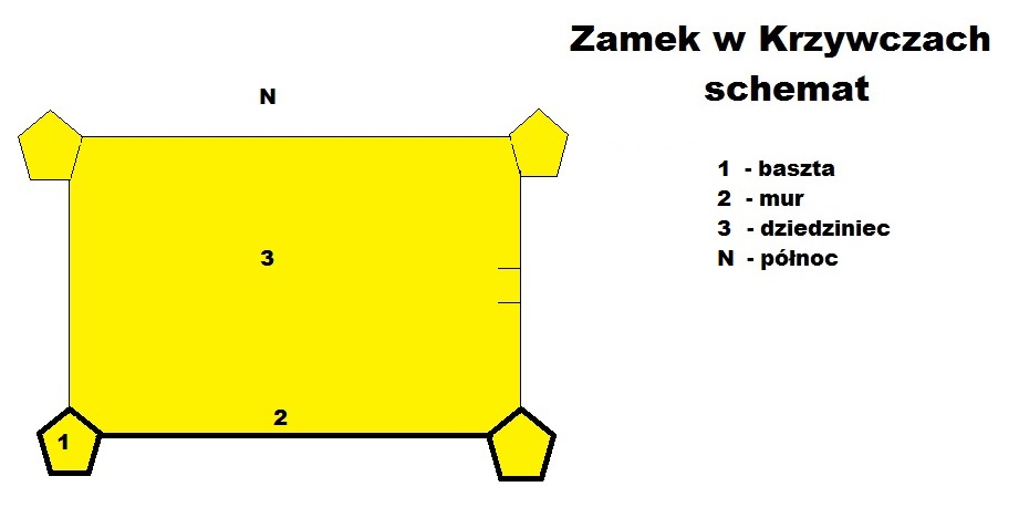 Zamek w Krzywczach. Schemat